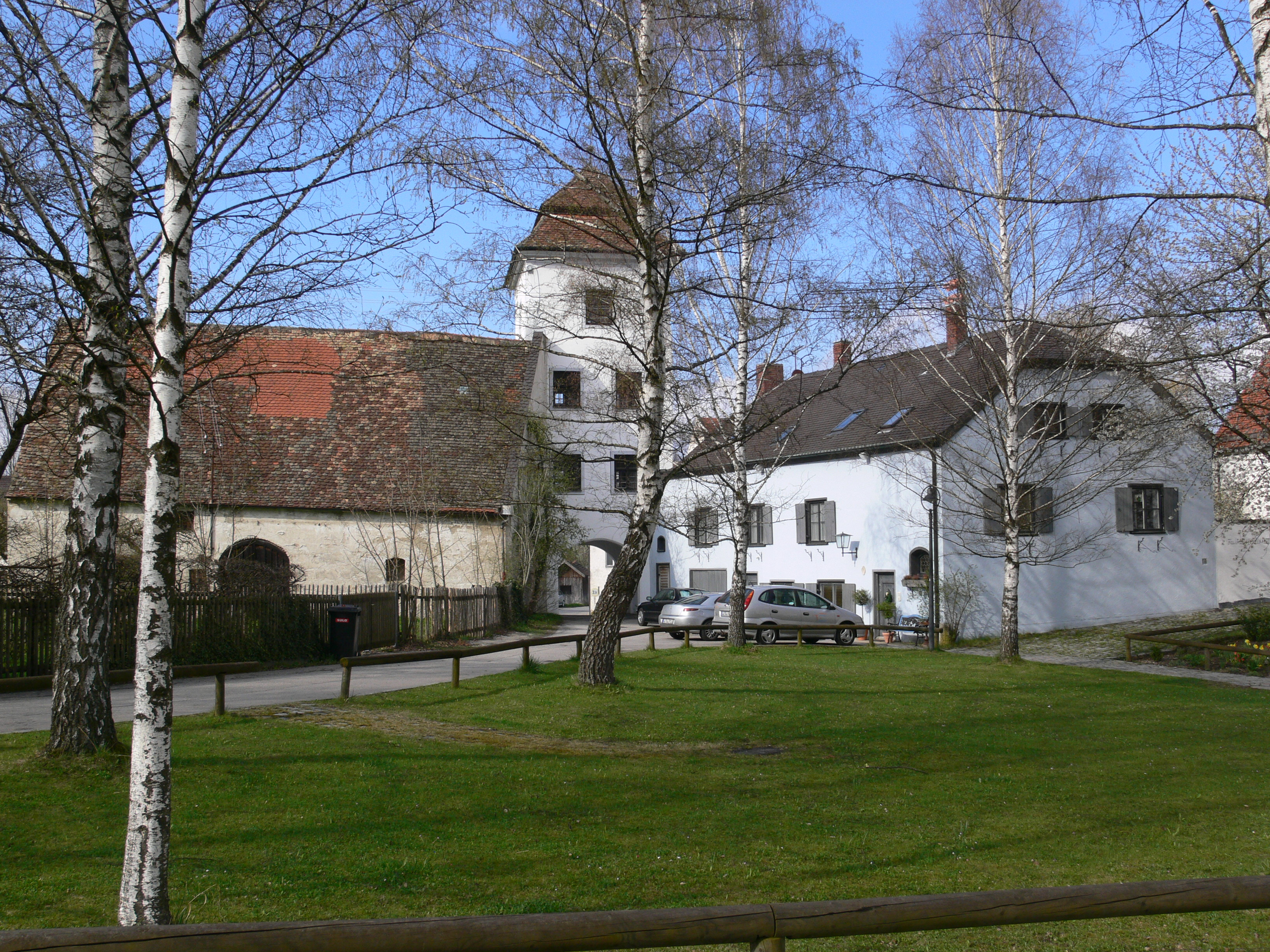 Augustiner-Chorherrenstift Dießen, Klostertor